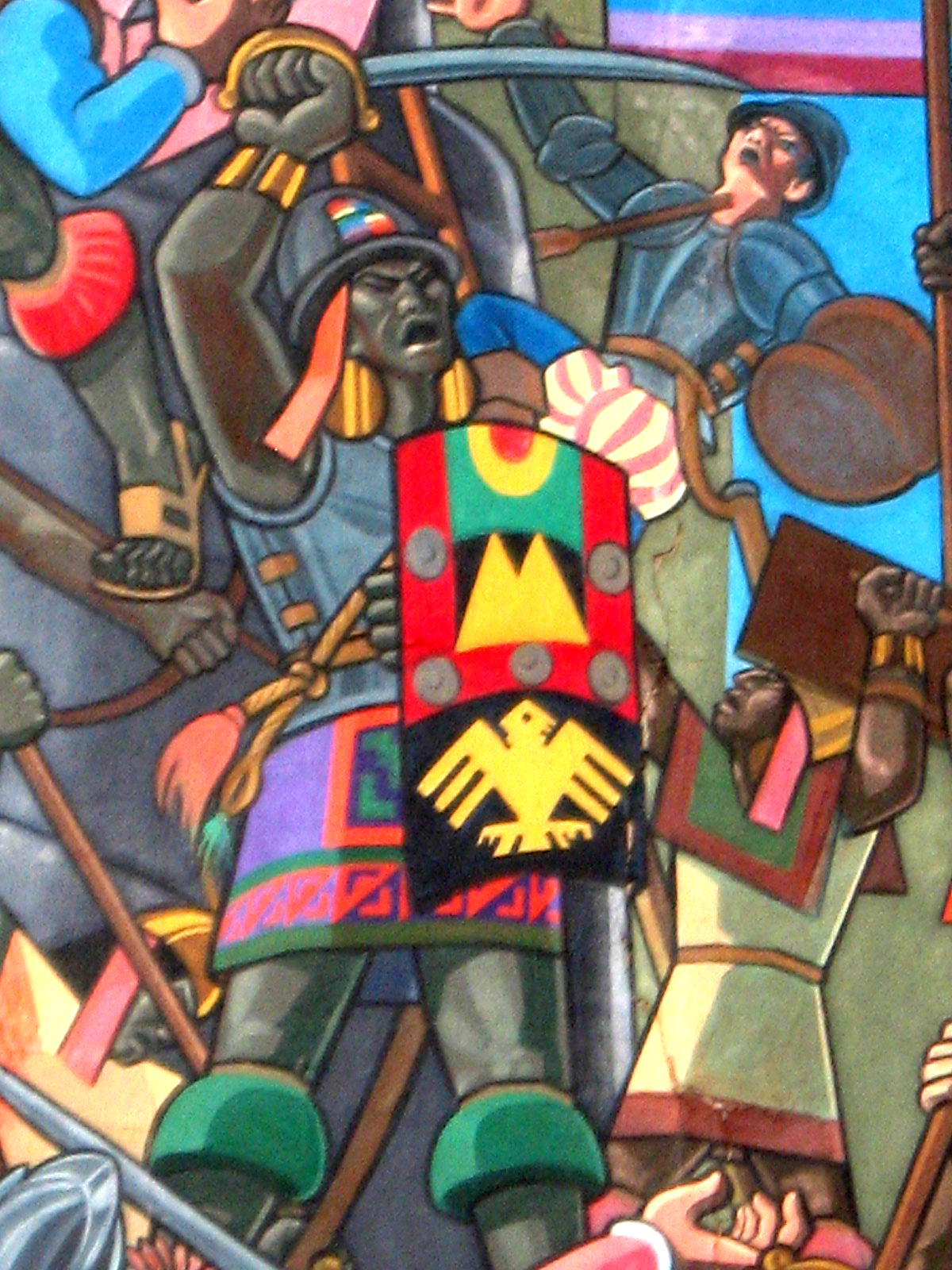 Retrato de Manco Inca según Juan Bravo